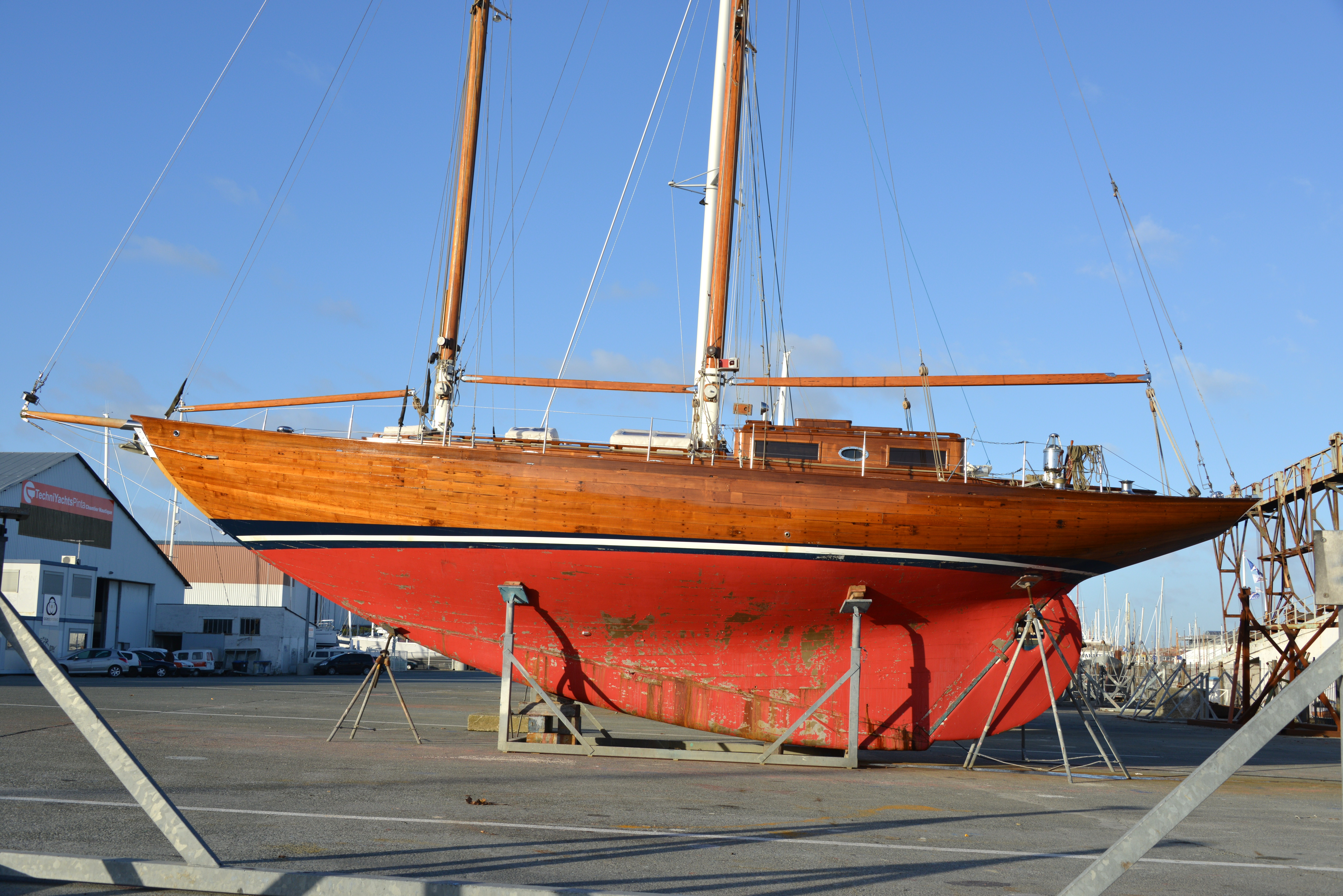 La goélette "La Gaillarde" ,sur ber, sur le plateau nautique de la Ville en Bois. Ce bateau de plaisance en teck a été construit par le chantier naval Abeking & Rasmussen à Brême (Allemagne) en 1939. Il mesure 15 mètres de longueur (LHT) et 3,25 mètres de large. A l' origine, c' était un ketch à wisbone. Il possède une quille longue. Quartier d' immatriculation: La Rochelle. Numéro d' imatriculation: 167304. Anciens noms: "Drei Schwestern" de 1939 à 1946 et "Nicéphore" de 1946 à 1970. Transformé en goélette en 1984. La Rochelle, Charente Maritime, France.